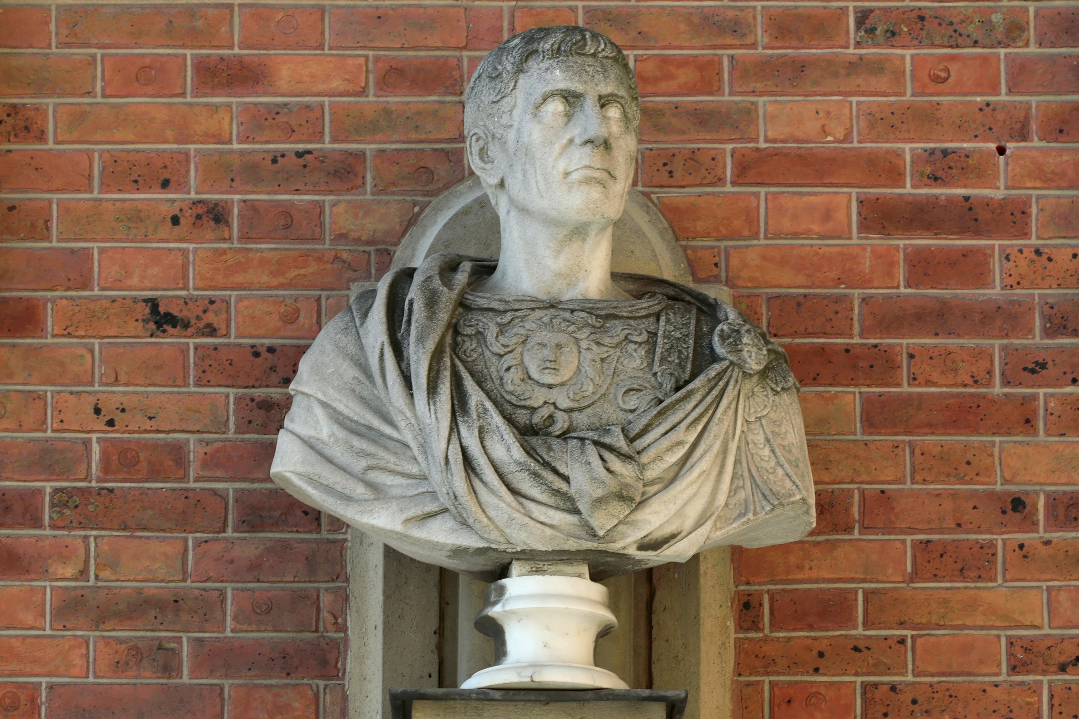 Château de Versailles, cour de marbre. Buste de Jules César. Numéro d'inventaire : Vdse 120